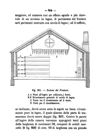 Sezione di fruttaio. Dal volume "Corso teorico-pratico sopra la coltivazione e potatura delle principali piante fruttifere" dei fratelli Marcellino e Pietro Giuseppe Roda, 3a ed., 1869.